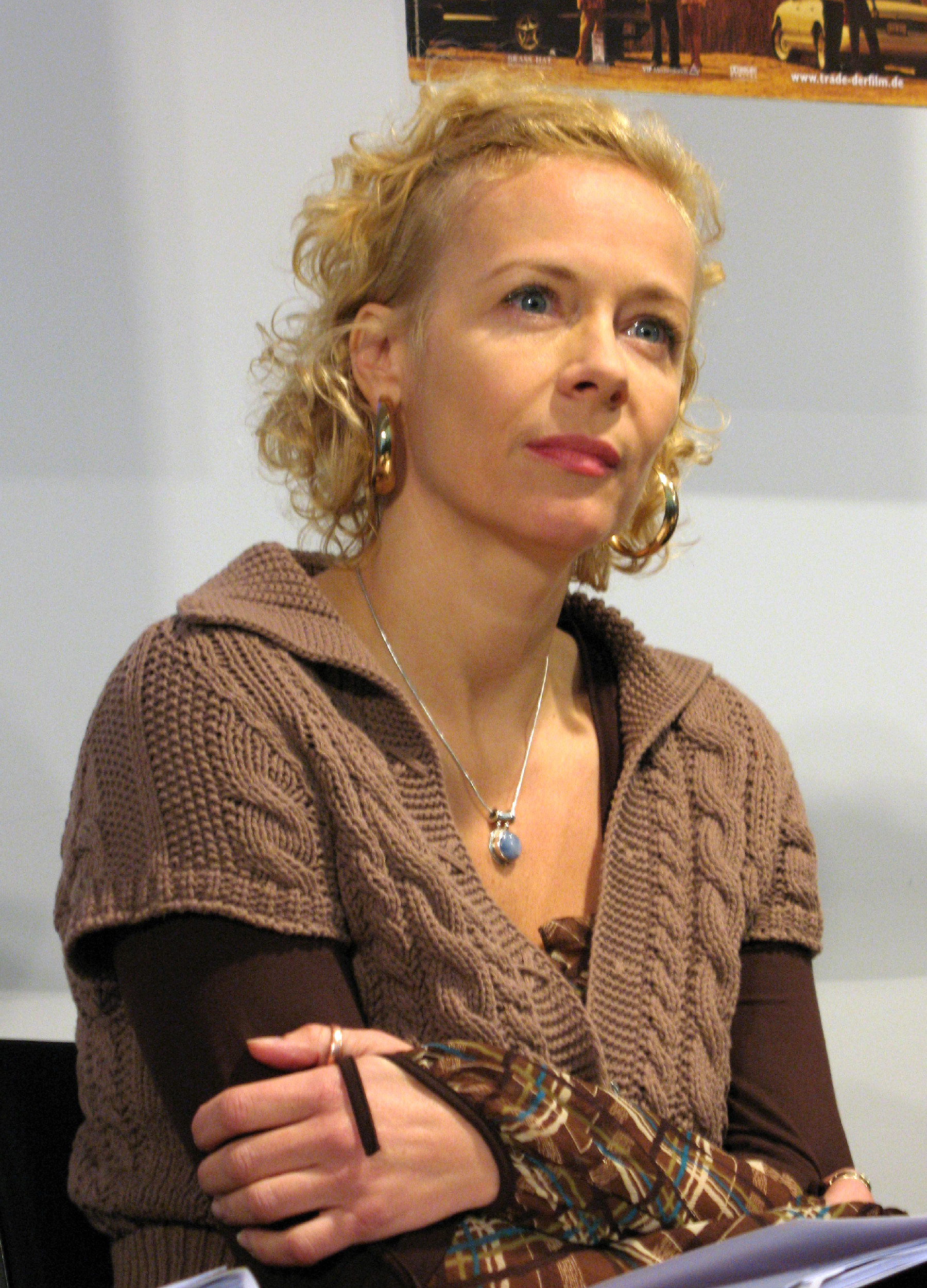 Katja Riemann bei der Pressekonferenz zur deutschen Filmpremiere Trade, Berlin, 11.10.2007